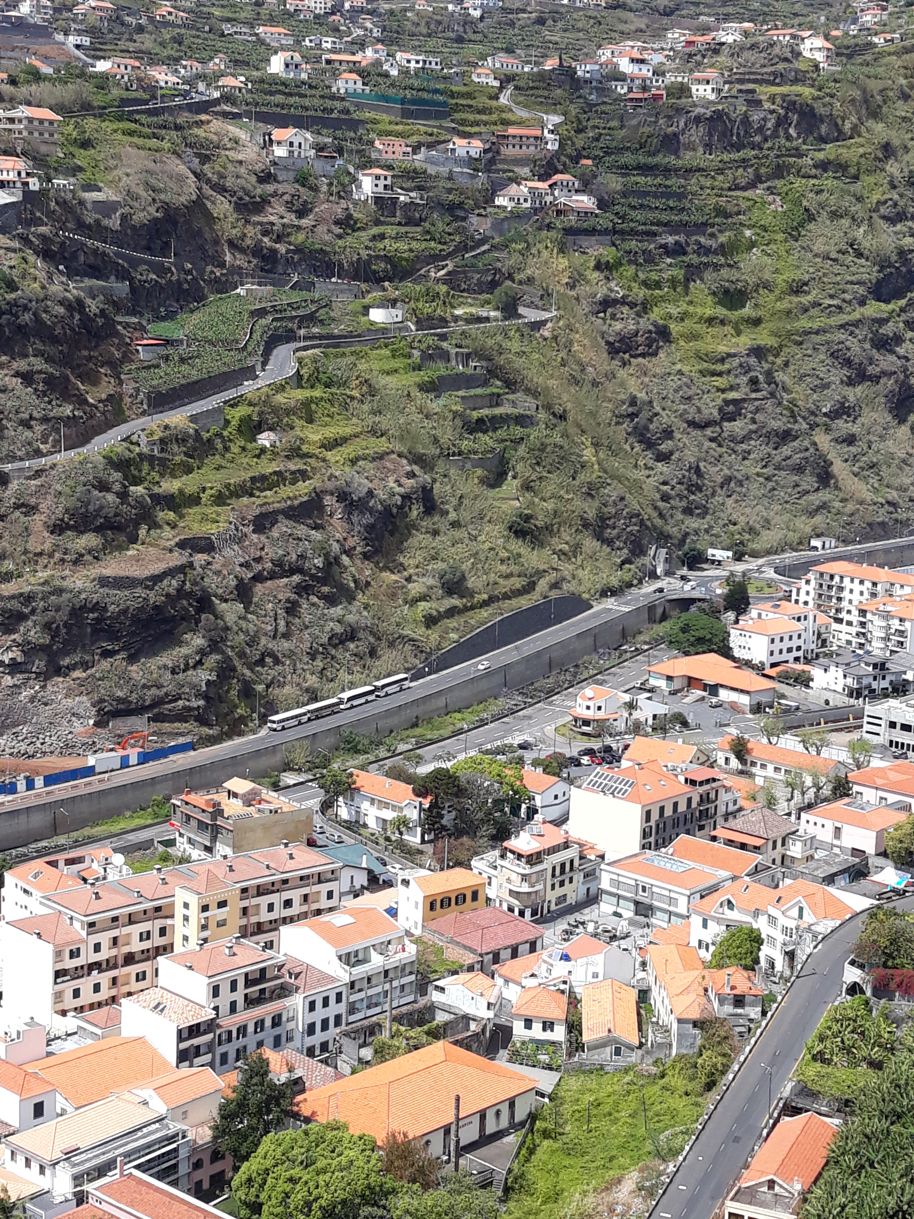 Parque